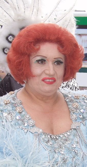 Curt Delander Aufnahme: 2.9.2007 Url